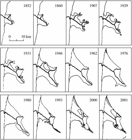 Kür çayının deltasının inkişaf dinamikası